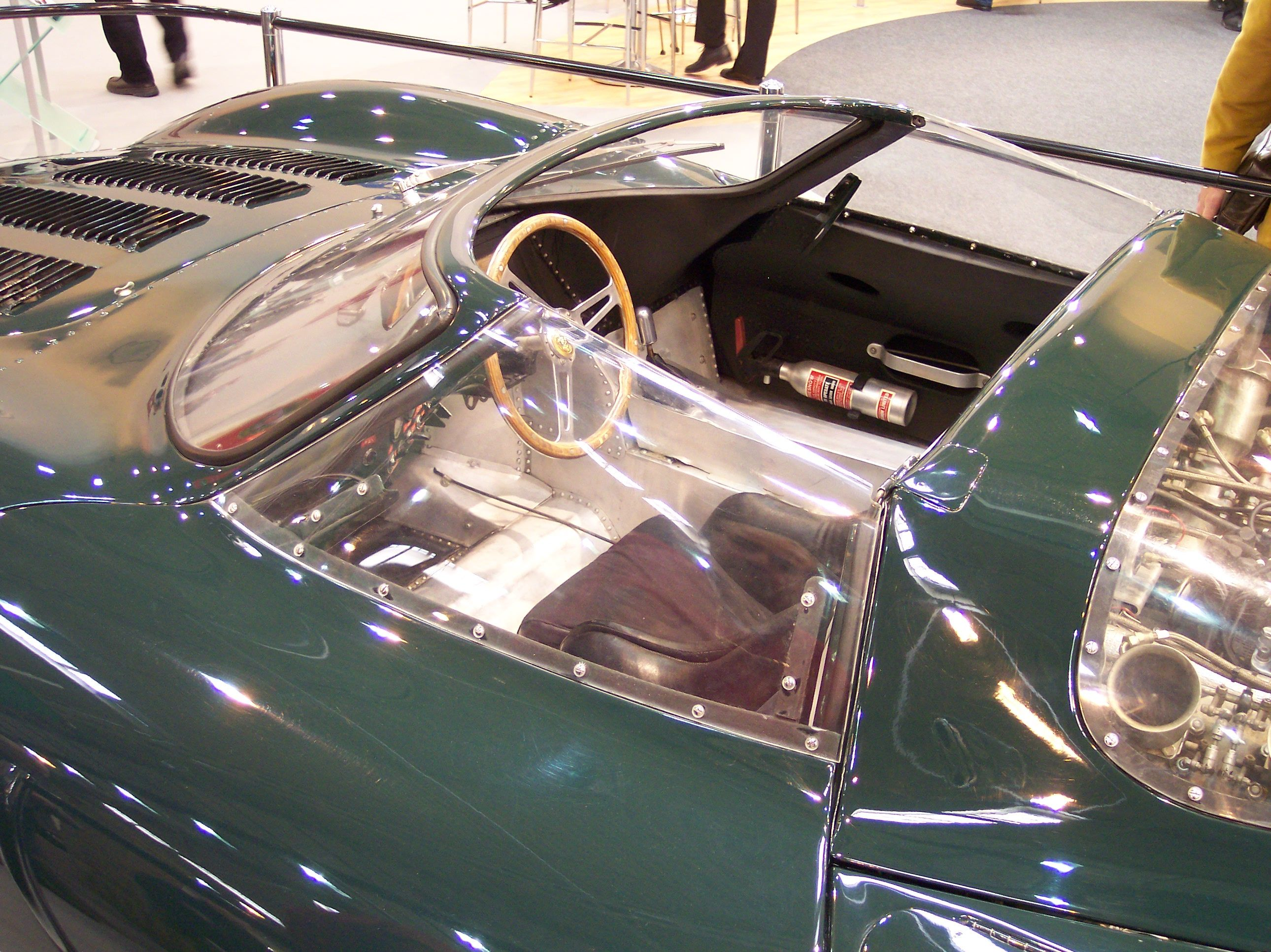 Jaguar XJ 13 cockpit